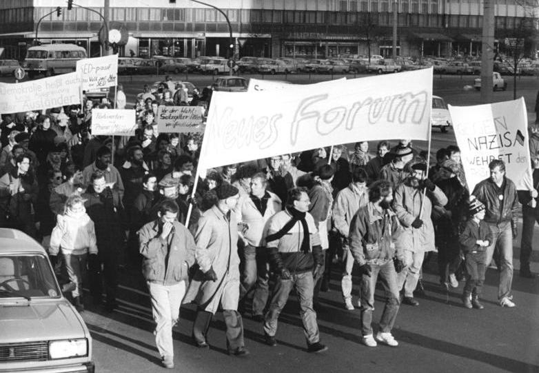 Berlin, Demonstration Neues Forum ADN-ZB Oberst 10.12.89 Berlin: Das Neue Forum hatte zu einer Demonstration anläßlich des bevorstehenden Internationalen Tages für Menschenrechte aufgerufen. An der Spitze des Zuges lief der Mitbegründer des Neuen Forum Prof. Jens Reich (2.v.l.) Abgebildete Personen: Reich, Jens Prof. Dr.: Mitbegründer des Neuen Forums, Molekularbiologe, DDR (GND 119135973)